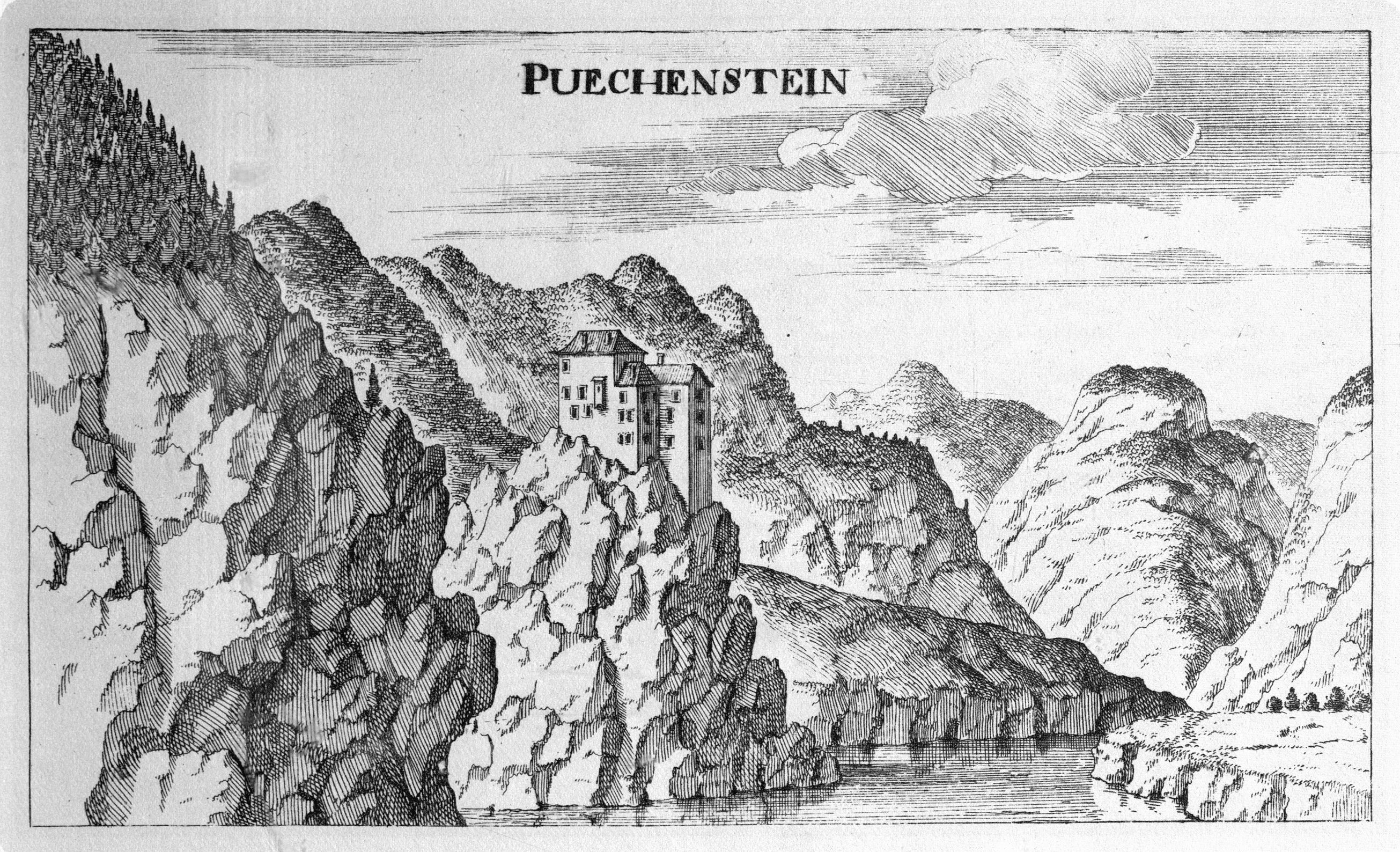 G. M. Vischers Käyserlichen Geographi, Topographia Ducatus Stiriae, Das ist: Eigentliche Delineation / und Abbildung aller Städte / Schlösser / Marcktfleck / Lustgärten / Probsteyen / Stiffter / Clöster und Kirchen / so es sich im Herzogthumb Steyrmarck befinden; Und anjetzo Umb einen billichen Preyß zu finden seynd Bey Johann Bitsch Universitäts Buchhandlern / Auff dem Juden=Platz bey der guldenen Saulen. Graz 1681 Die Nummerierung der Dateien folgt der alphabetischen Reihung der Orte